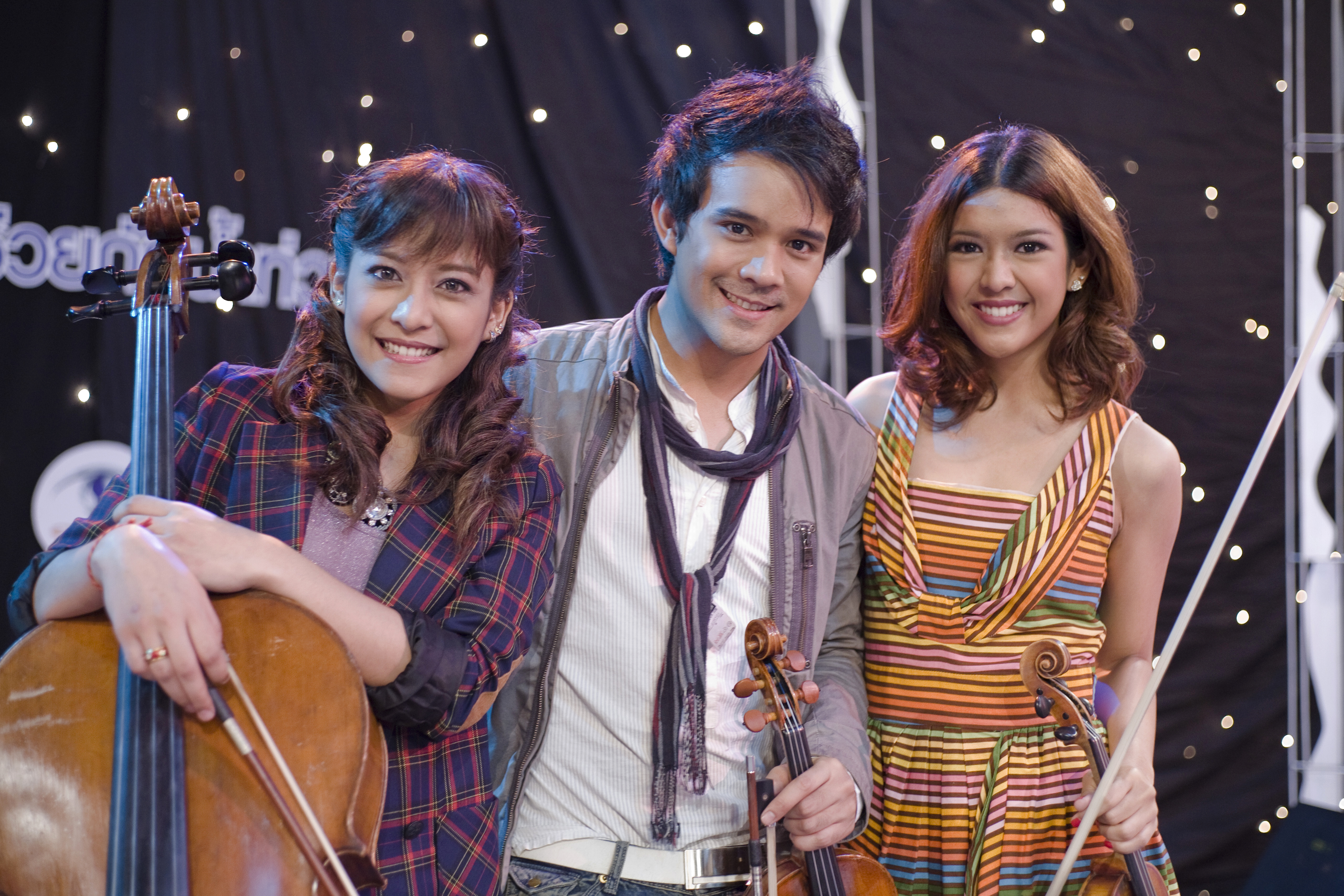 นายกรัฐมนตรีร่วมรับโทรศัพท์ผู้บริจาคเงินและสิ่งของในรายการ "ราษฏ์ รัฐ รวมใจ ช่วยภัยน้ำท่วม" ณ ช่อง 9 อสมท. วันพฤหัสบดี ที่ 21 ตุลาคม พ.ศ.2553 (Photographer attached to the Prime Minister of the Kingdom of Thailand : Peerapat Wimolrungkarat / พีรพัฒน์ วิมลรังครัตน์) @is50mm